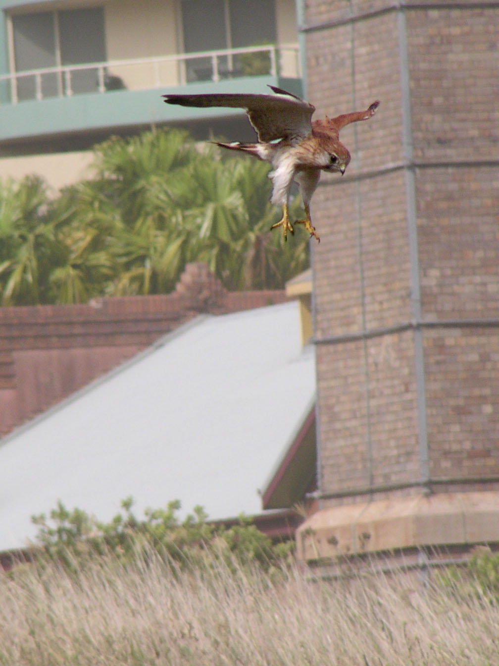 Nankeen Kestrel hunting over long grass at Waverton